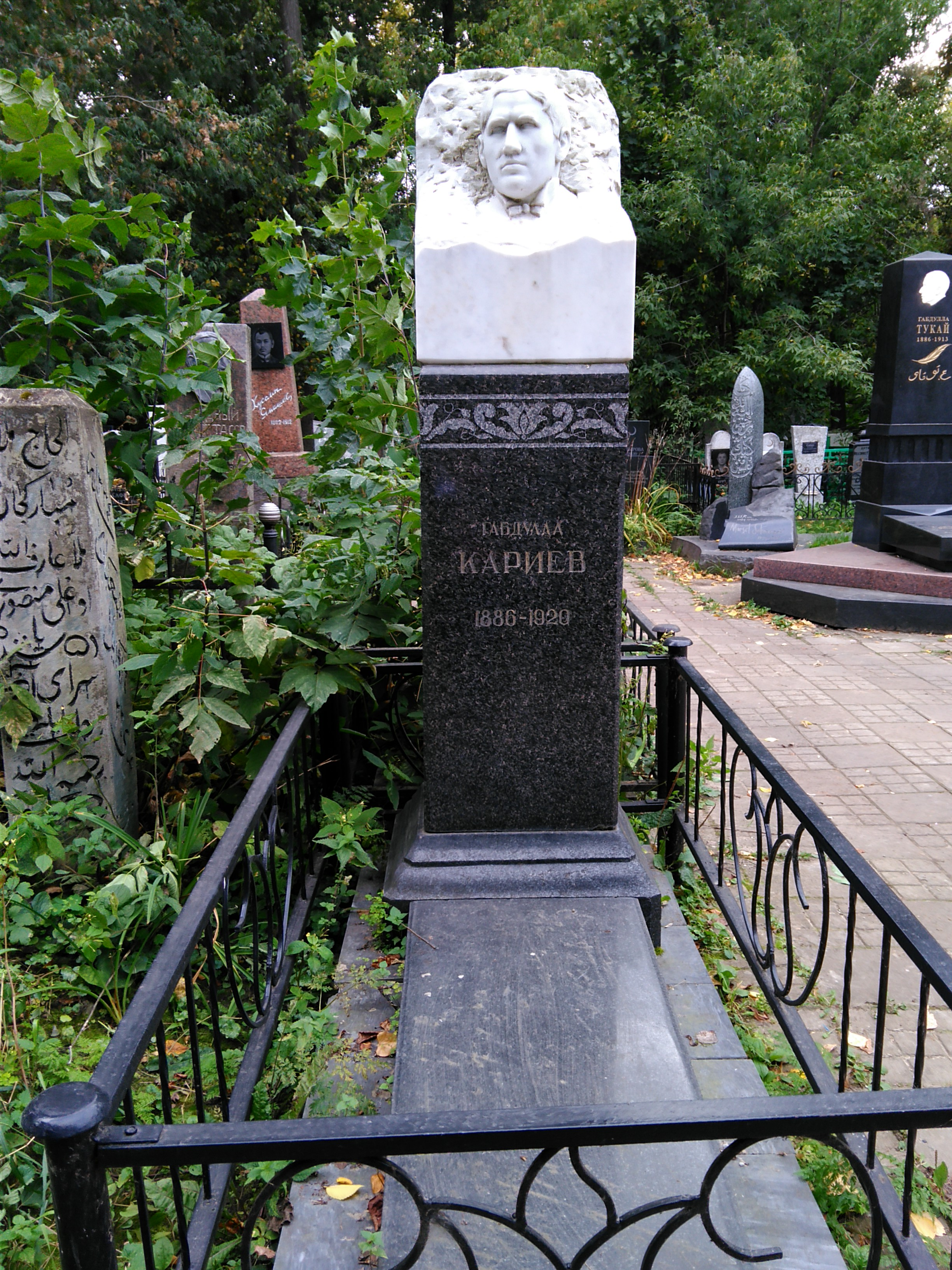 Могила Габдуллы Кареева, артиста, основателя татарского театра: татарское кладбище, Казань, Татарстан